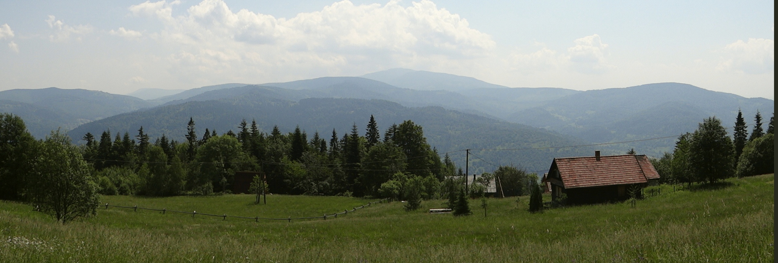 Panorama widokowa z Łoska